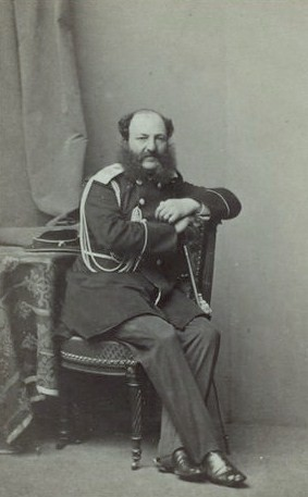 Барон Александр Карлович Тетенборн (Титтенборн) (1815—1889), генерал-майор свиты Е. И. В. с 17.04.1860 по 16.04.1867 года.